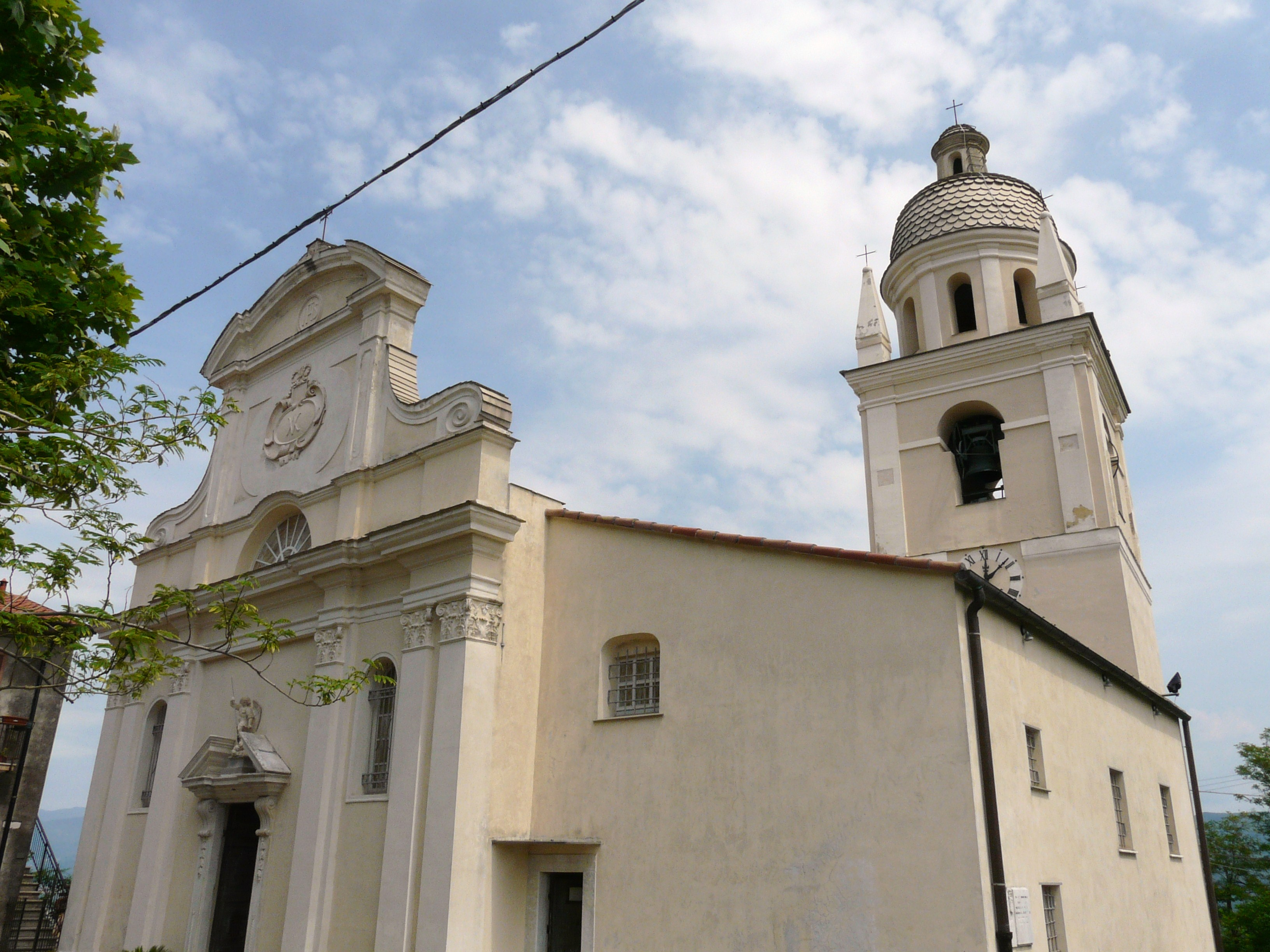 Complesso laterale della pieve di San Michele Arcangelo, Trebiano Magra, Arcola, Liguria, Italia